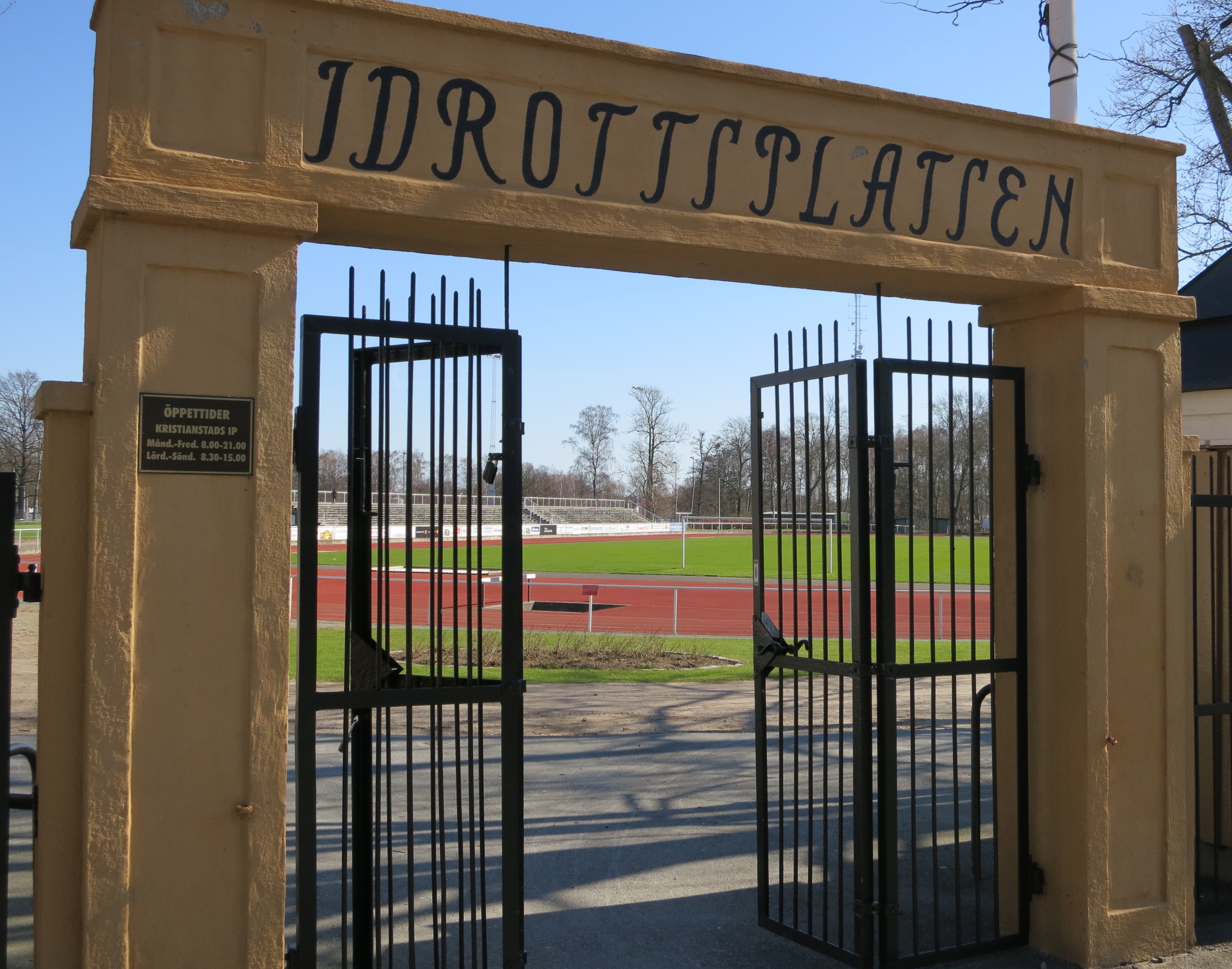 Idrottsplatsen, Kristianstad